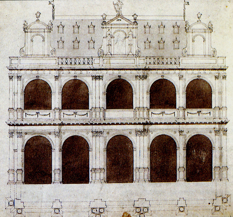 Historische Darstellung, Entwurf der Rathaus-Renaissance Laube